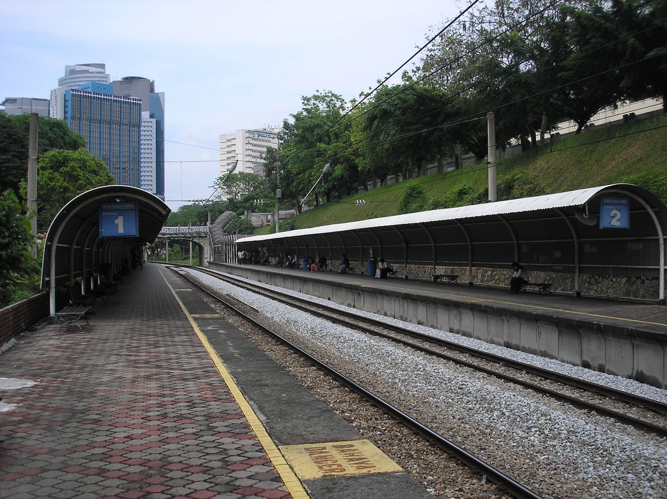 The Bank Negara station (Rawang-Seremban/Sentul-Port Klang), Kuala Lumpur, Malaysia.